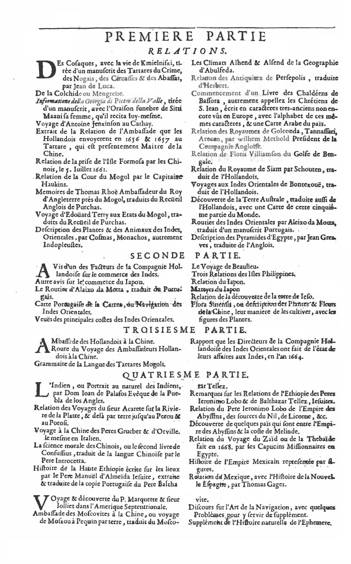 Table des Relations des quatre parties des Relations de divers voyages curieux éditées par Melchisédech Thévenot, Paris, 1683